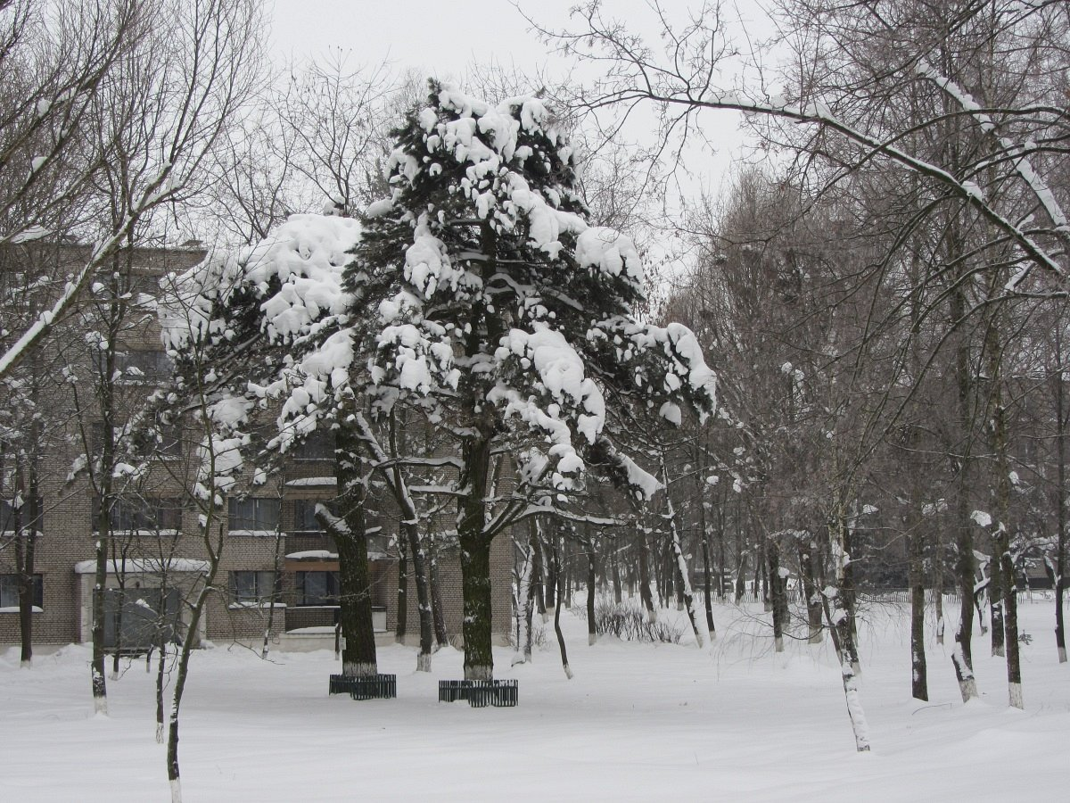 Хвоі чорныя Смілавіцкія Батанічны помнік прыроды рэспубліканскага значэння Ў 25 кіламетрах на захад ад горада Чэрвень, у гарадскім пасёлку Смілавічы, вуліца Максіма Горкага, дом 16 (інтэрнат Смілавіцкага дзяржаўнага аграрнага каледжа)